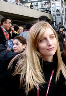 Daiana Hissa en la COP realizada en Copenague en 2009